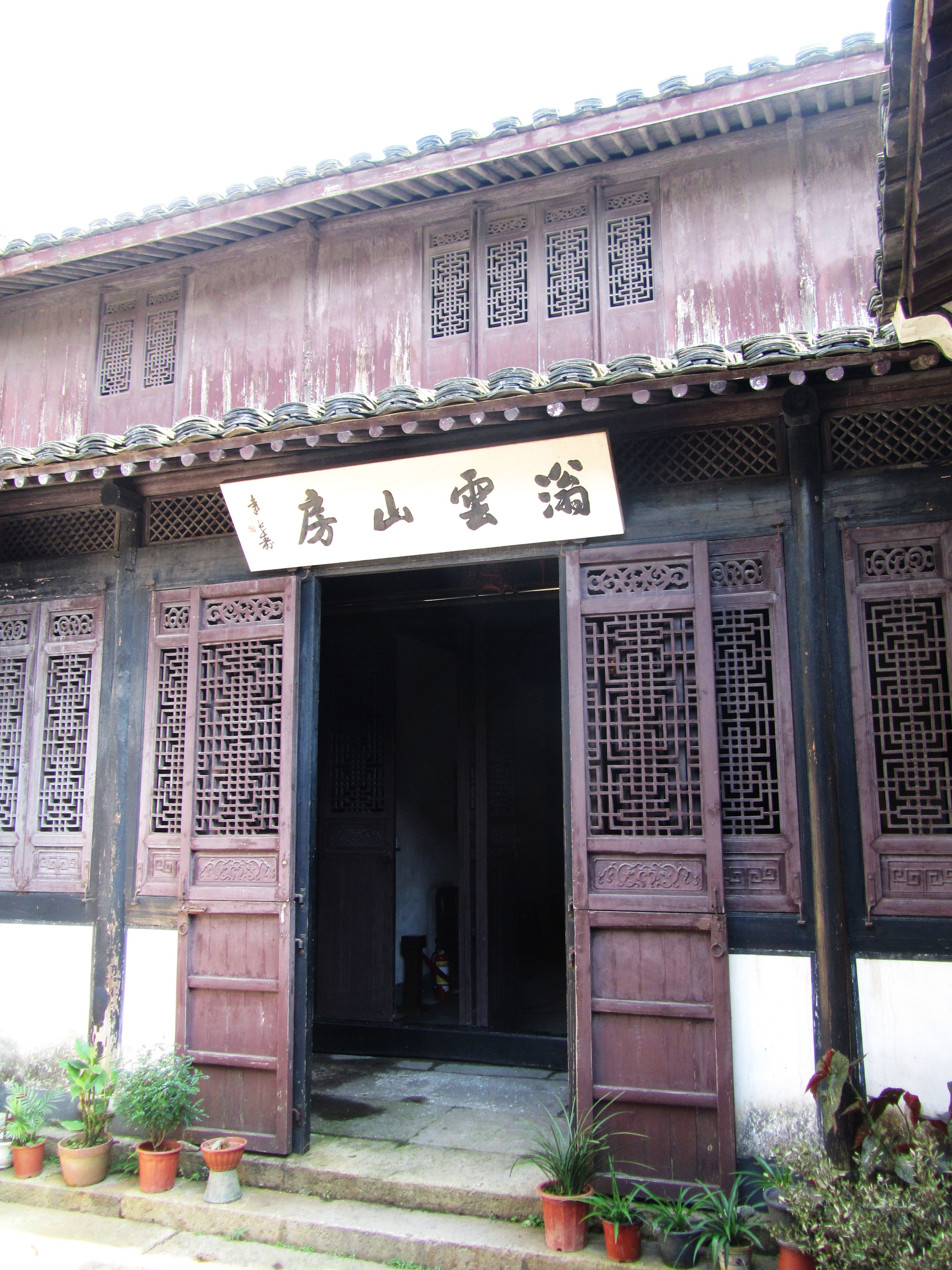 绍兴章学诚故居，楼屋。